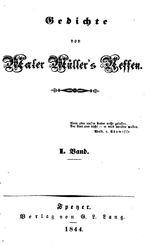 Christian Heinrich Gilardone, Titelblatt zu seinem Buch 1844